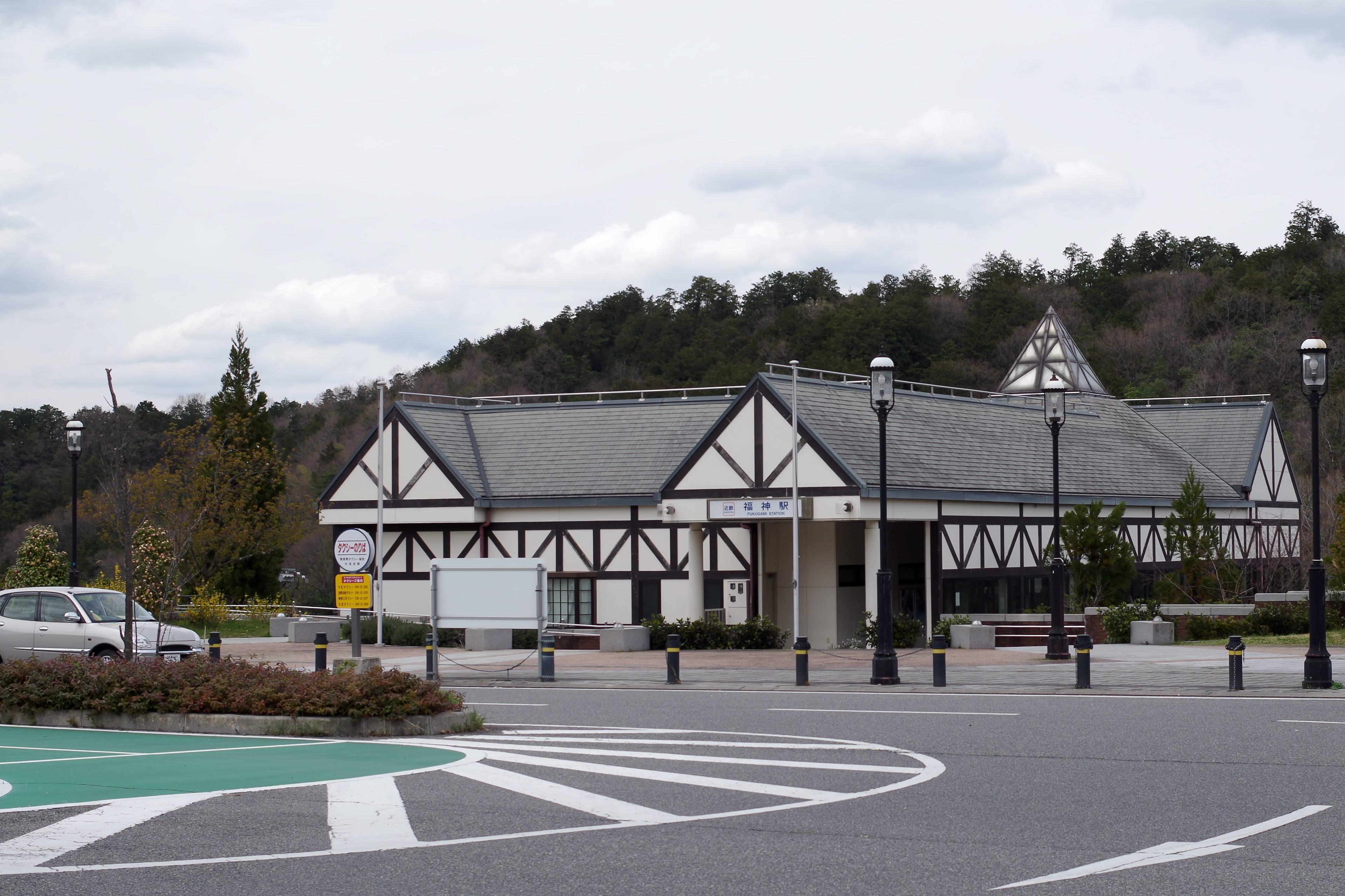 近鉄吉野線 福神駅 2014.4.03